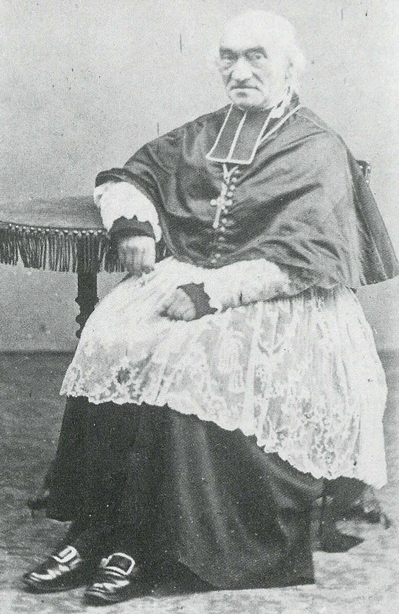 Hendrik Frans Bracq (1804-1888) - bisschop van Gent (1864-1888) - Gent - Oost-Vlaanderen - België